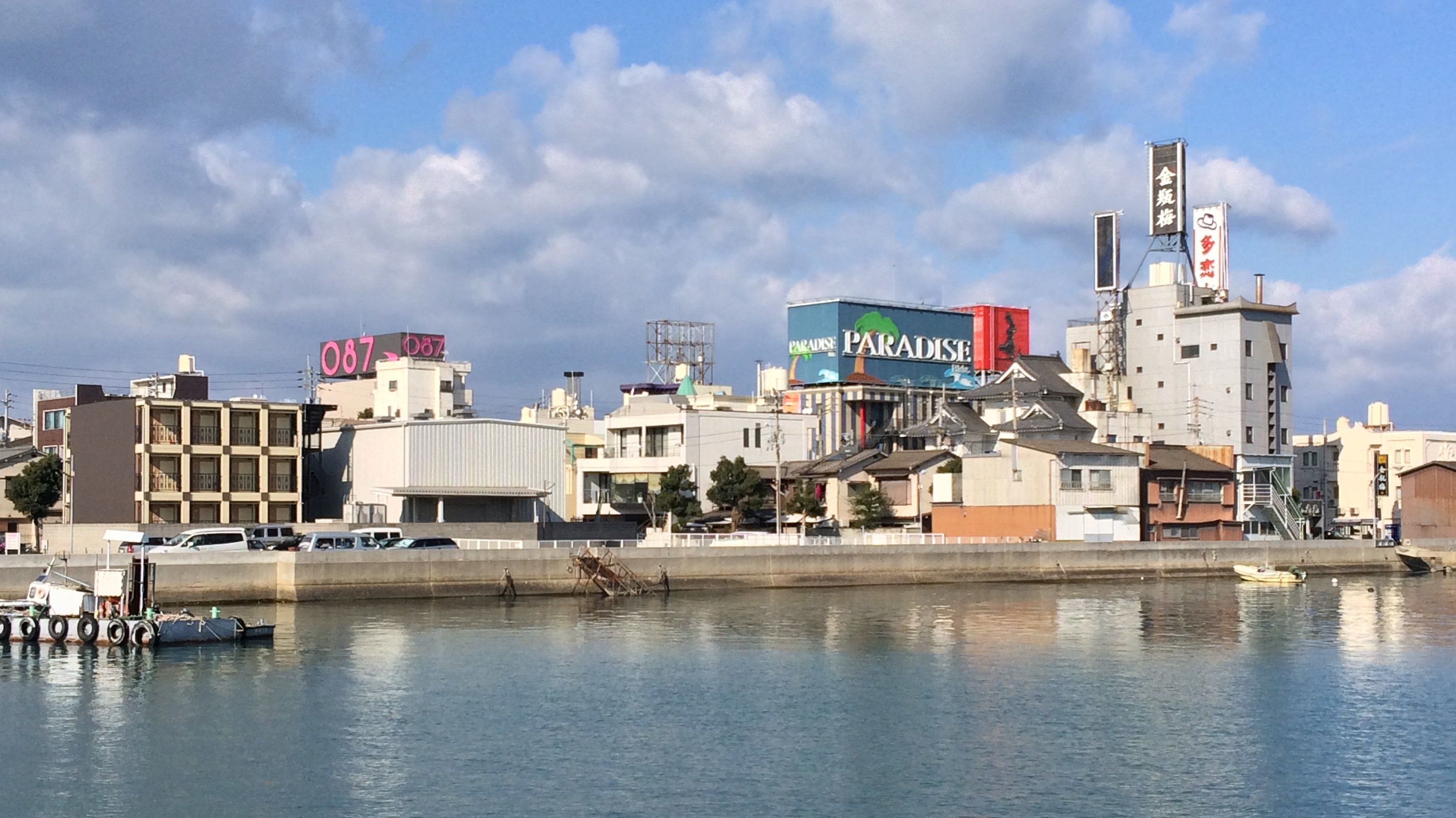 香川県高松市城東町二丁目の八重垣新地を東からみる。